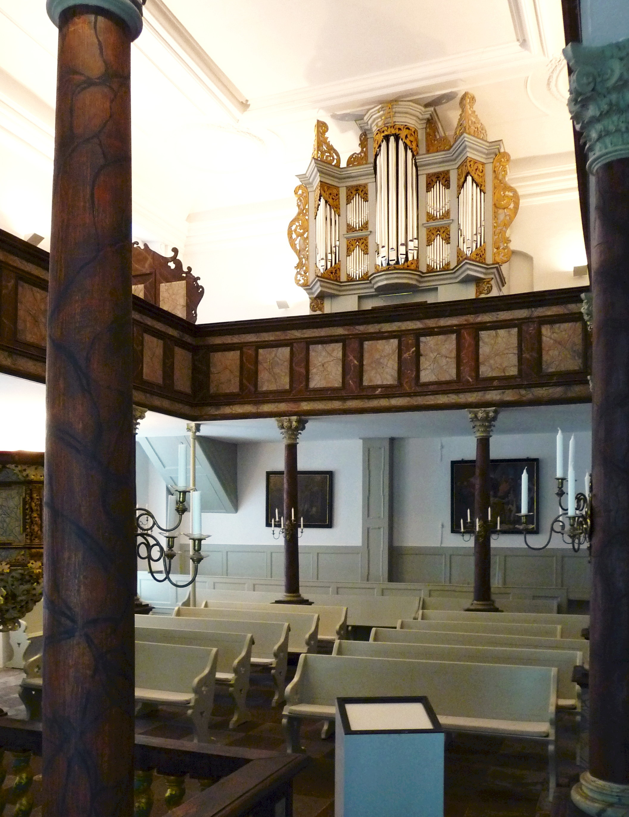 Eutiner Schloss-Kirche, orgel